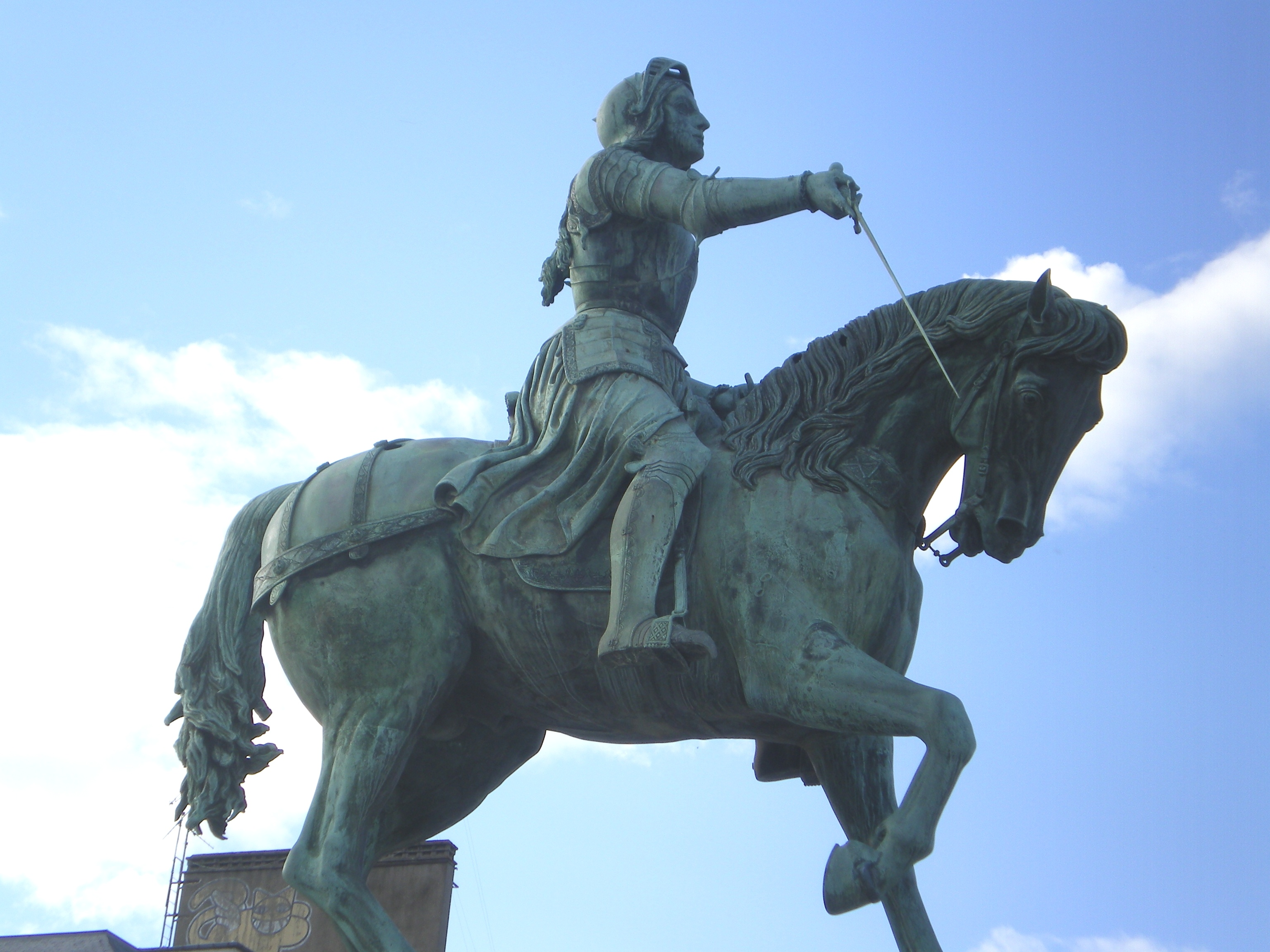 פסל זאן דארק במרכז העיר העתיקה של אורליאן